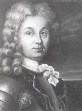 Portrait d'époque de Joseph le Moyne de Sérigny